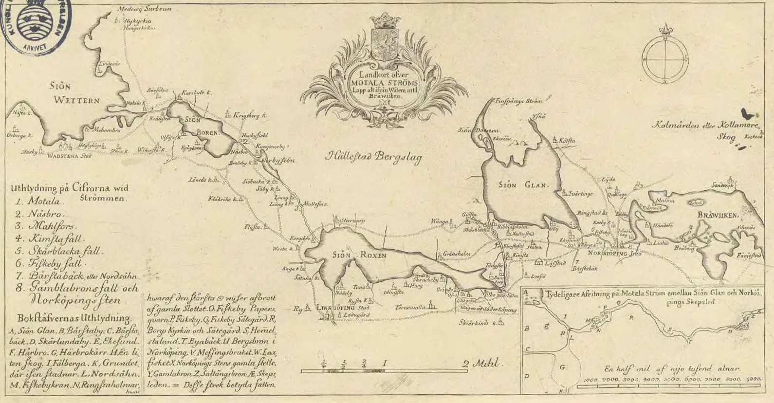 Gammal karta över Motala ström från Vättern till Bråviken i Norrköping.